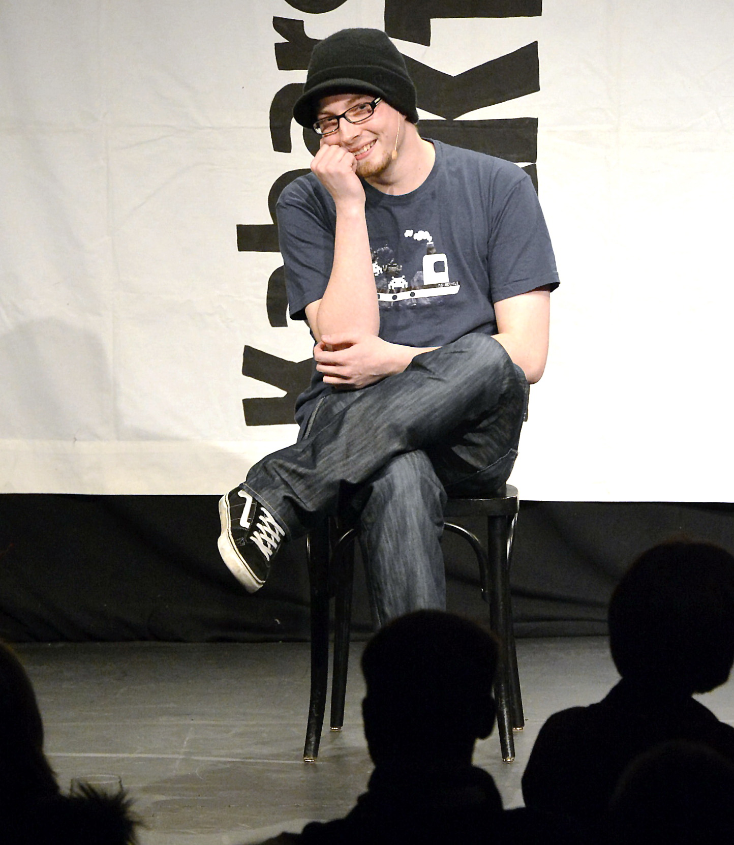 Tom Schildhauer